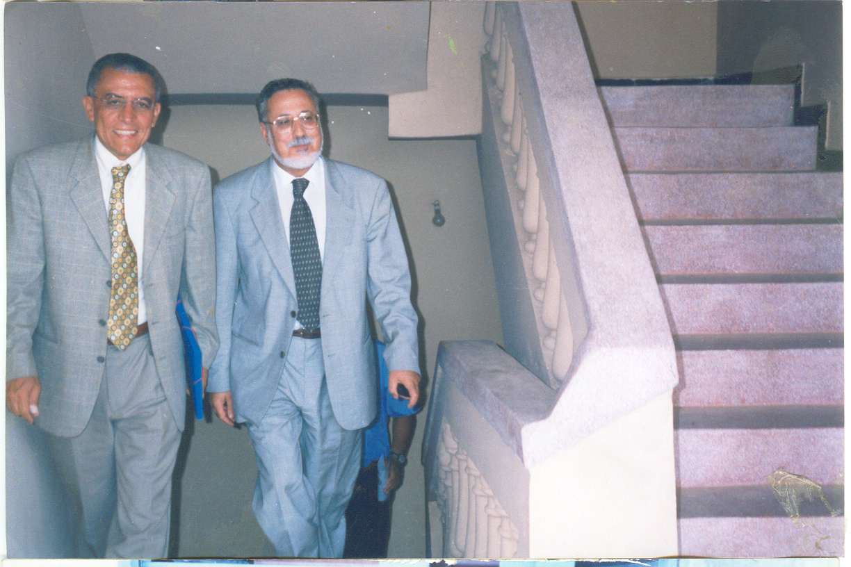 Ismail Alaoui (secrétaire général du PPS en campagnie du parlementaire Abdellatif ouammou en visite au bureau parlementaire à Tiznit en 1998